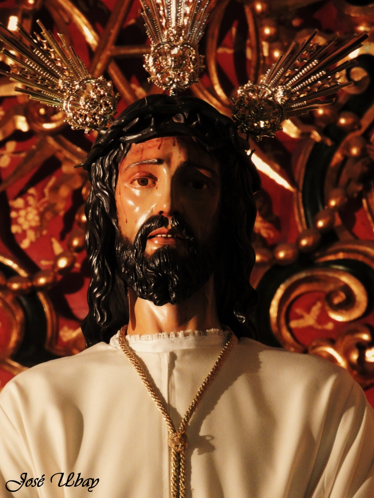 Nuestro Padre Jesús de la Salud (1985). José Paz Vélez. Parroquia de Santo Domingo de Guzmán - Las Palmas de Gran Canaria.